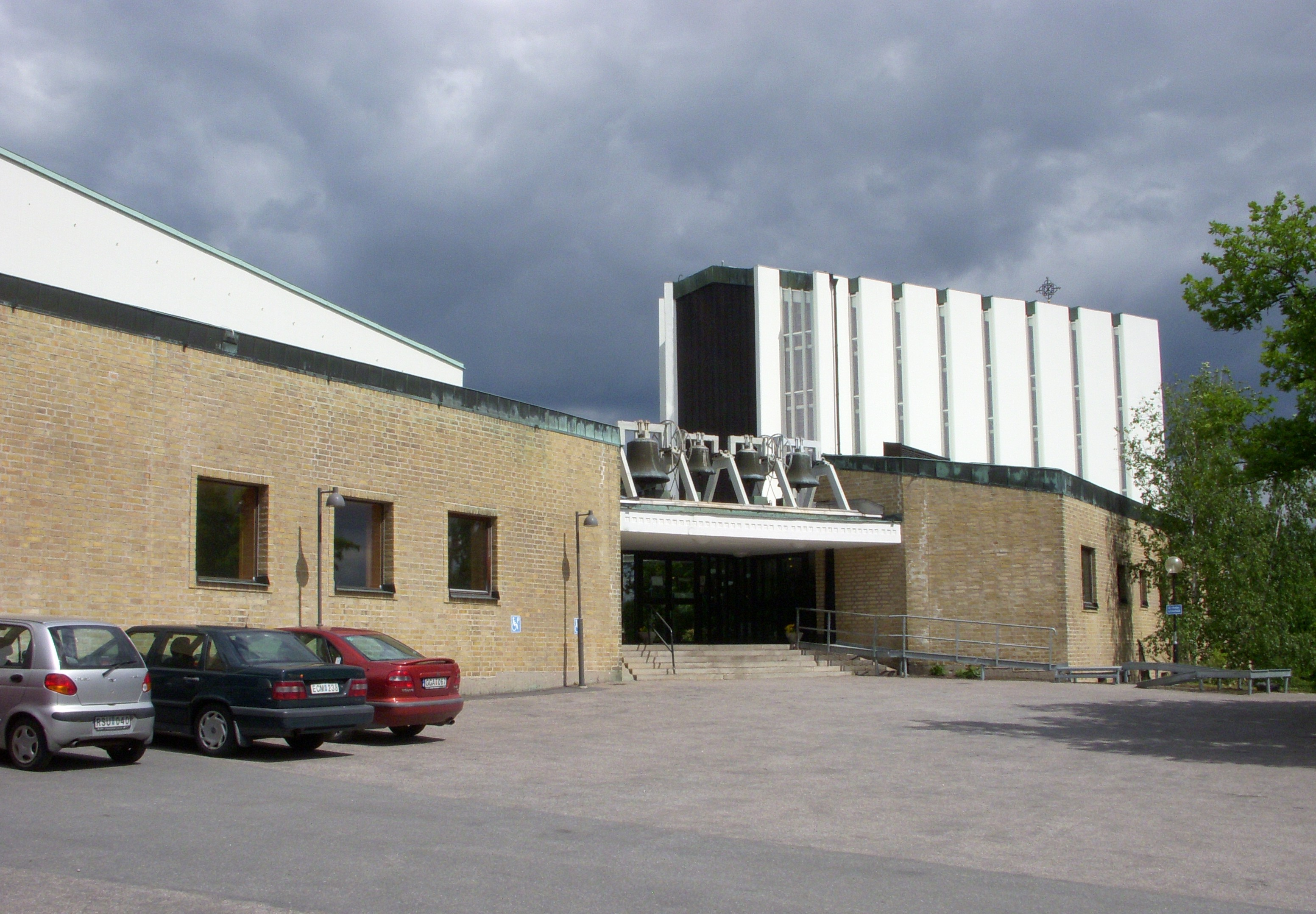 Uppenbarelsekyrkan i Hägersten, arkitekt Johannes Olivegren